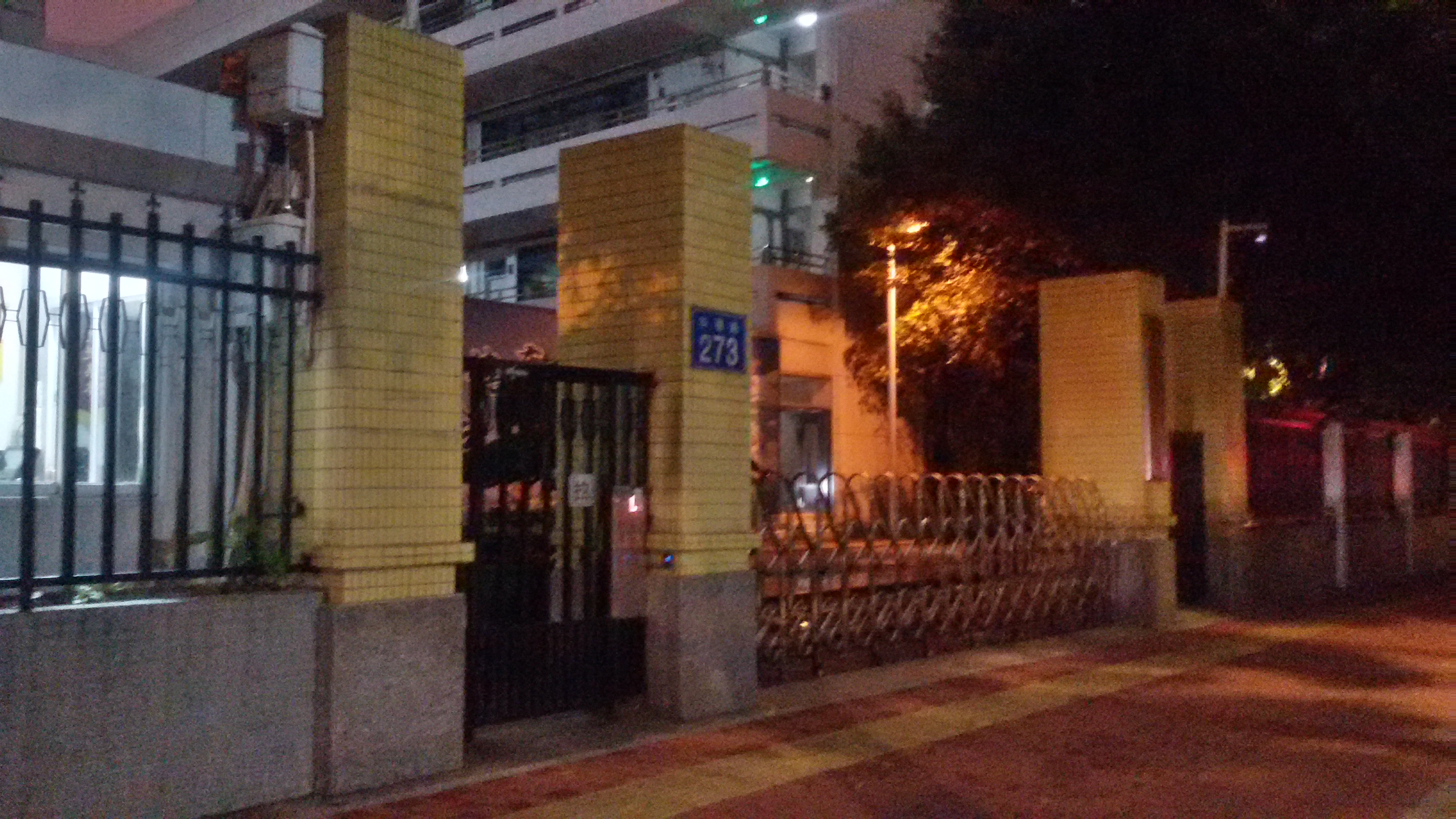 粵語: 廣州市啟聰學校